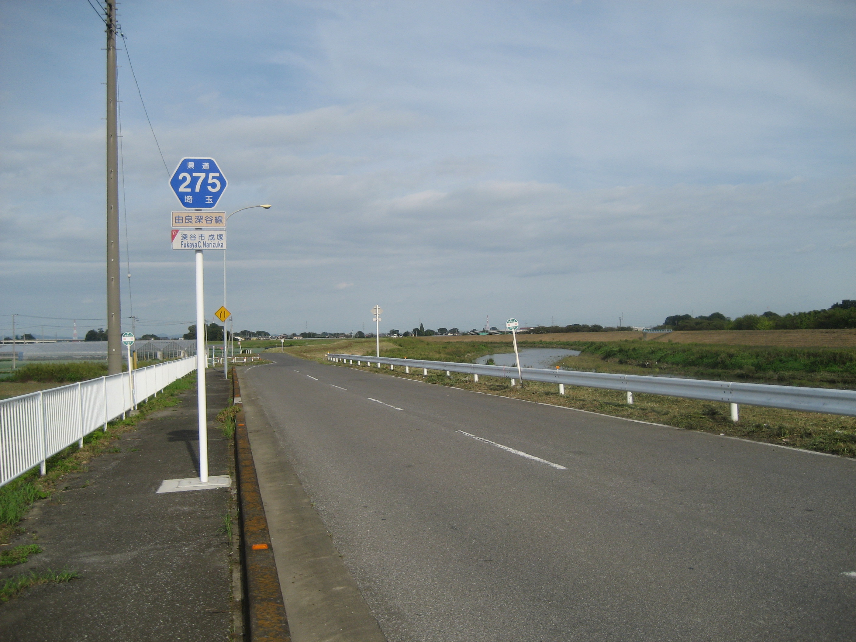 埼玉県道275号線深谷市内